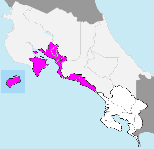 Región Pacífico Central, Costa Rica